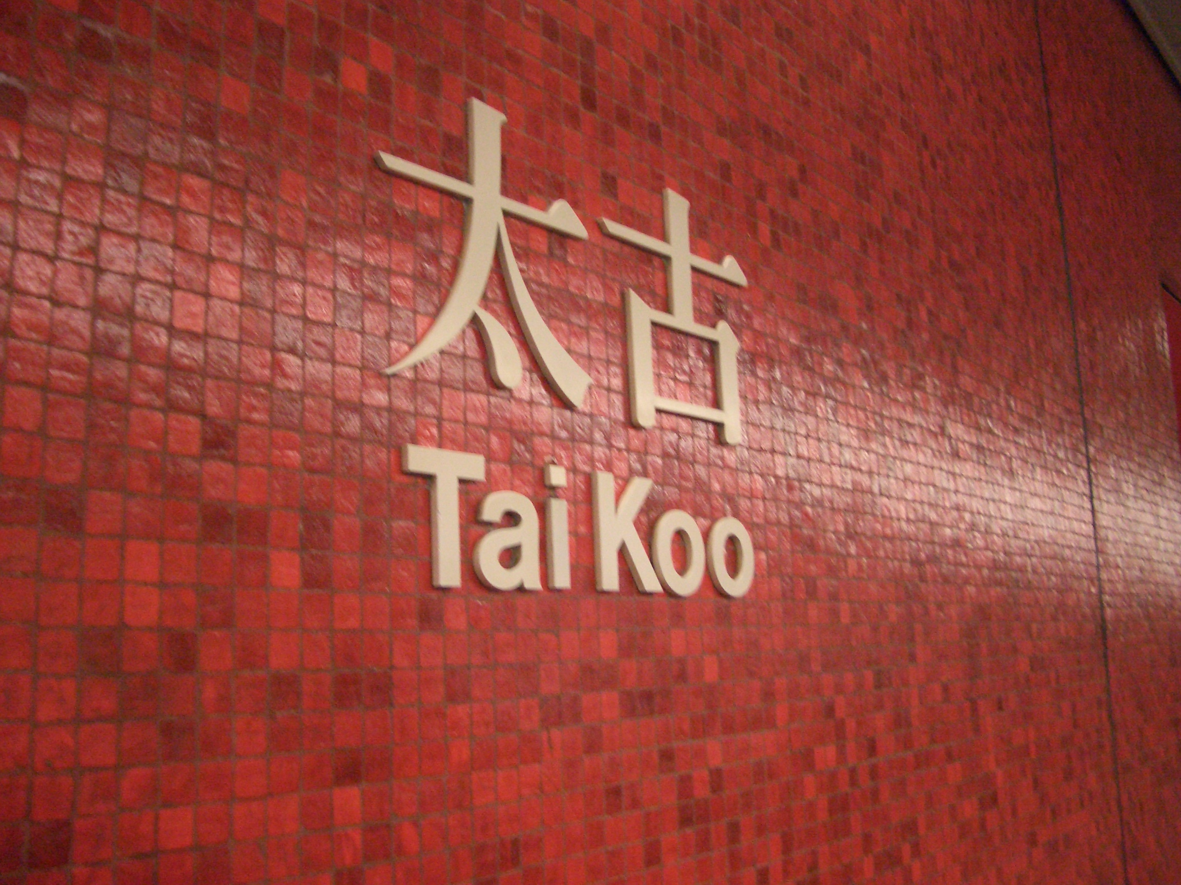 地鐵太古站名稱